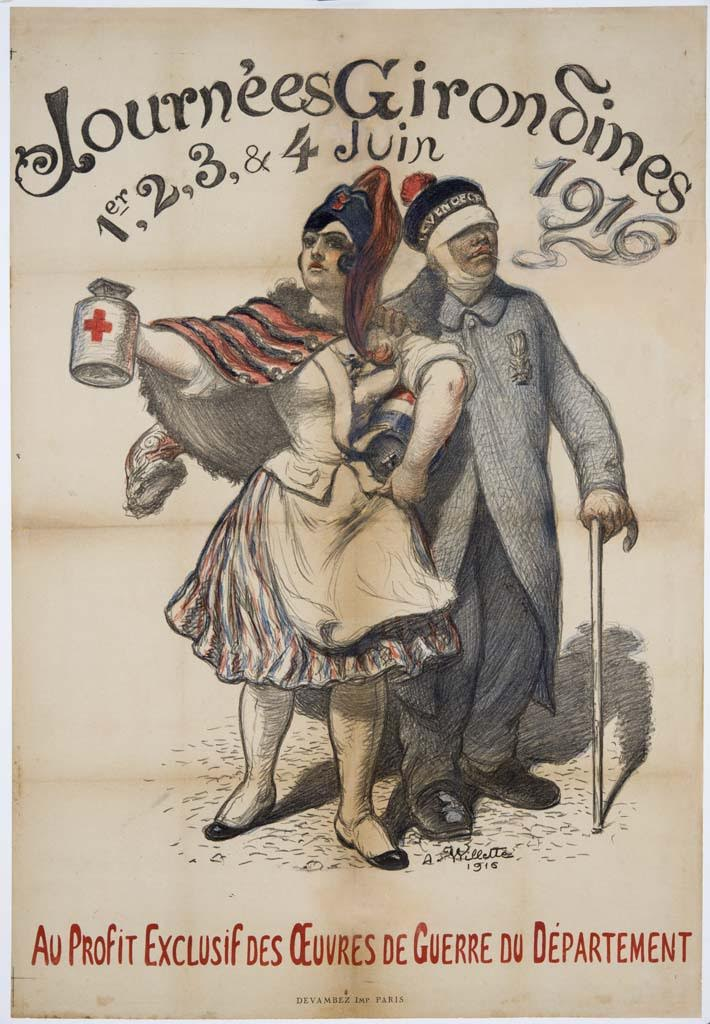 Journées girondines 1er, 2, 3 et 4 juin 1916